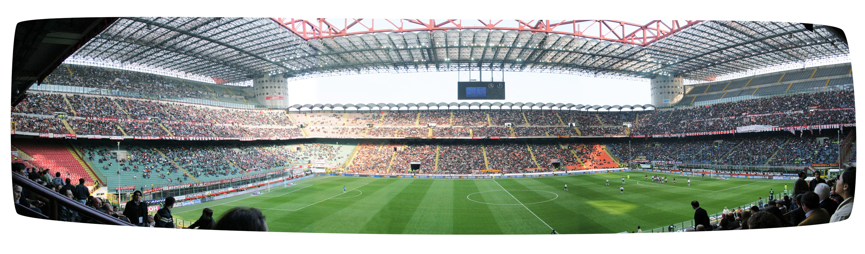 Bigger 4 Fun! Panoramica di San Siro (Giuseppe Meazza) La partita è Milan-Atalanta